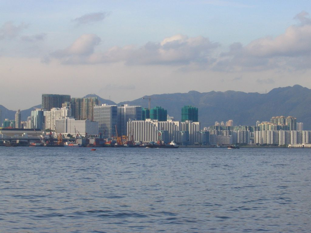 紅磡灣 Hung Hom Bay